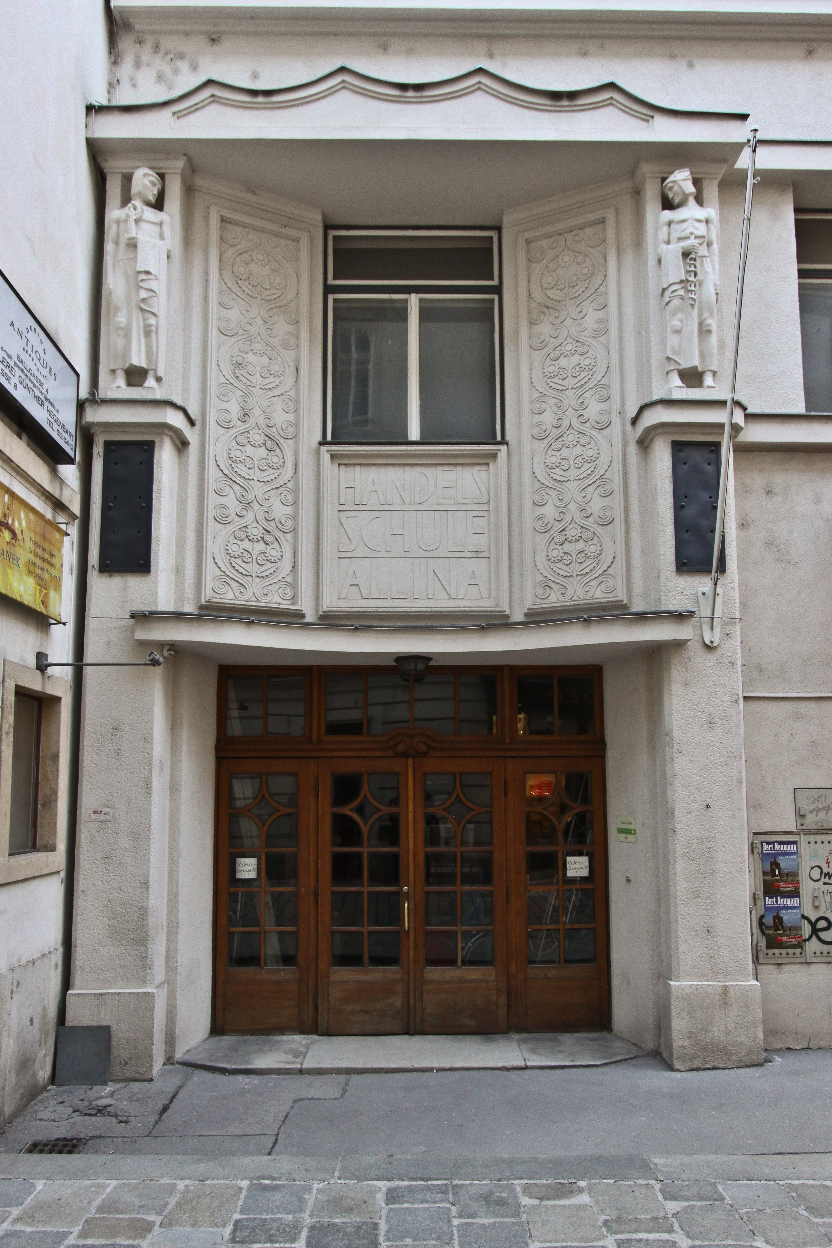 Ehem. Handelsschule Allina